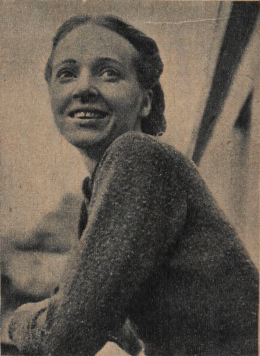 Marie-Claude Vaillant-Couturier. Photographie publiée dans le magazine Regards du 27 décembre 1946.